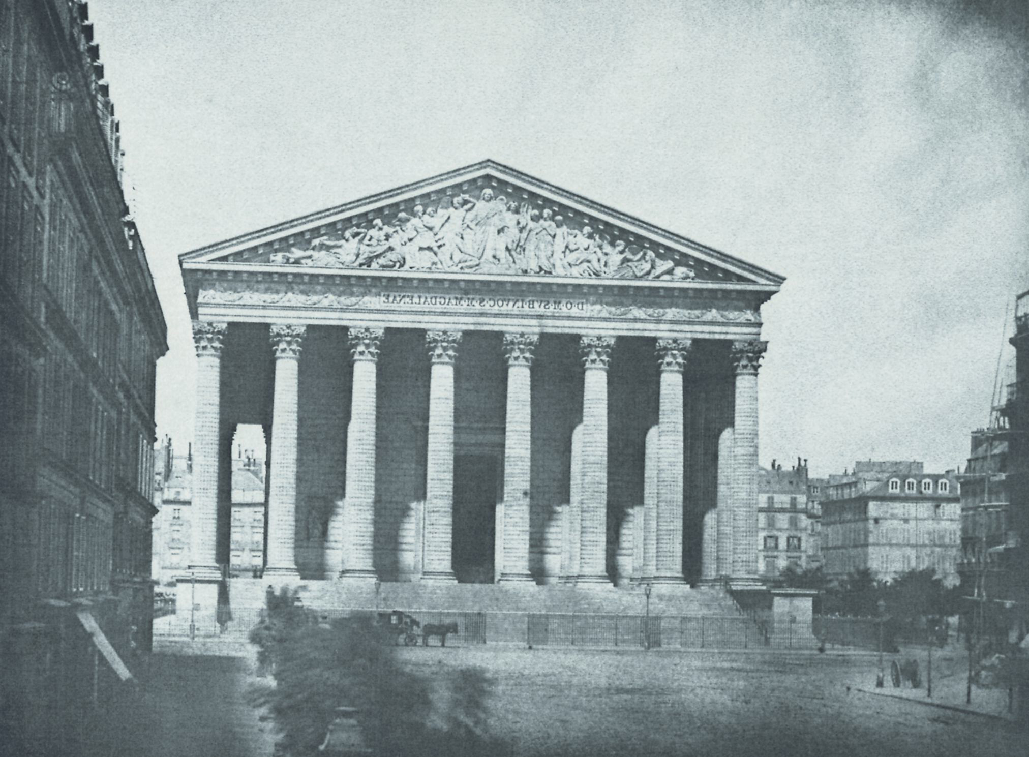 Bayard, Hippolyte: Die Madeleine und Umgebung